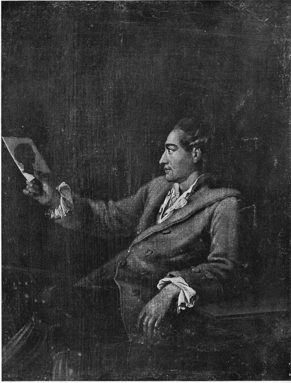 Goethe gemalt von Georg Melchior Kraus 1777, Ölgemälde im Besitz Dr.Vulpius, Weimar (1932)